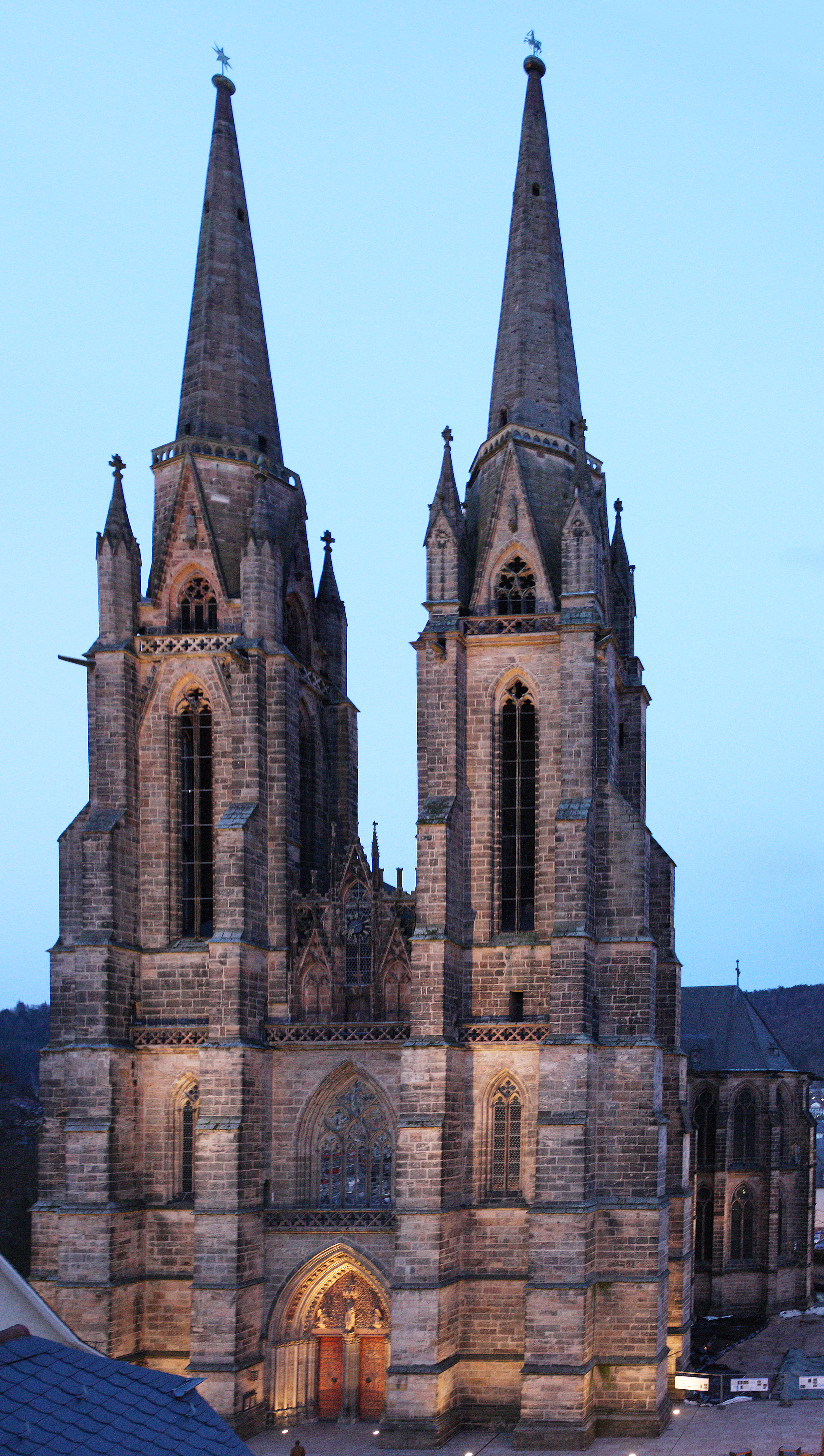 Die Elisabethkirche in Marburg, mit Uhu im Vierpass des rechten Turms